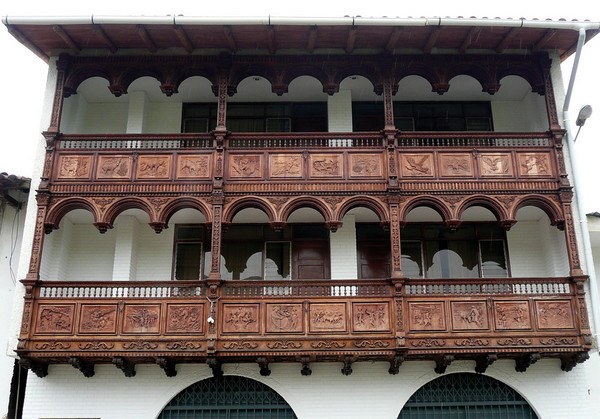 Balcón con tallas de las actividades cotidianas en la provincia.